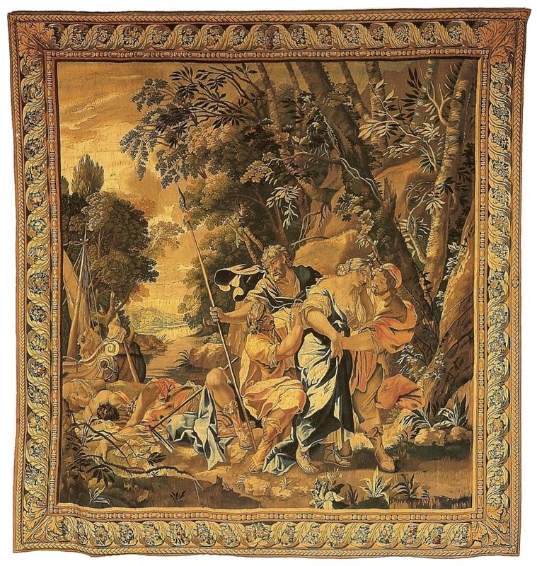 O Rapto de Ifigênia (tapeçaria; 310 × 296 cm)